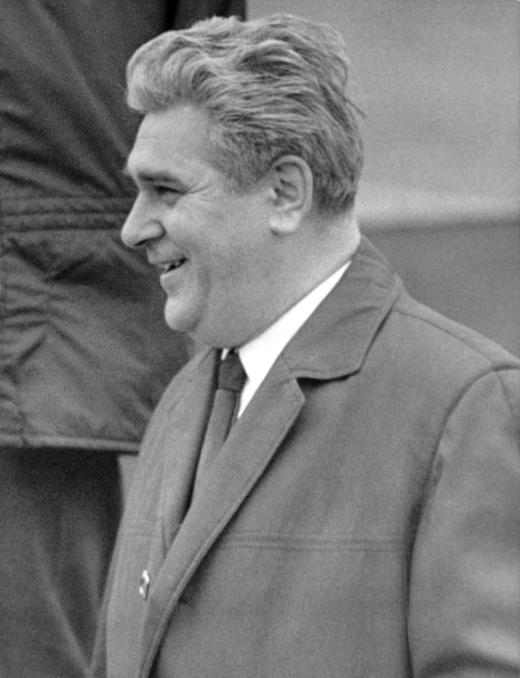 Prof. Nikolaus Joachim Lehmann (1921-1998)